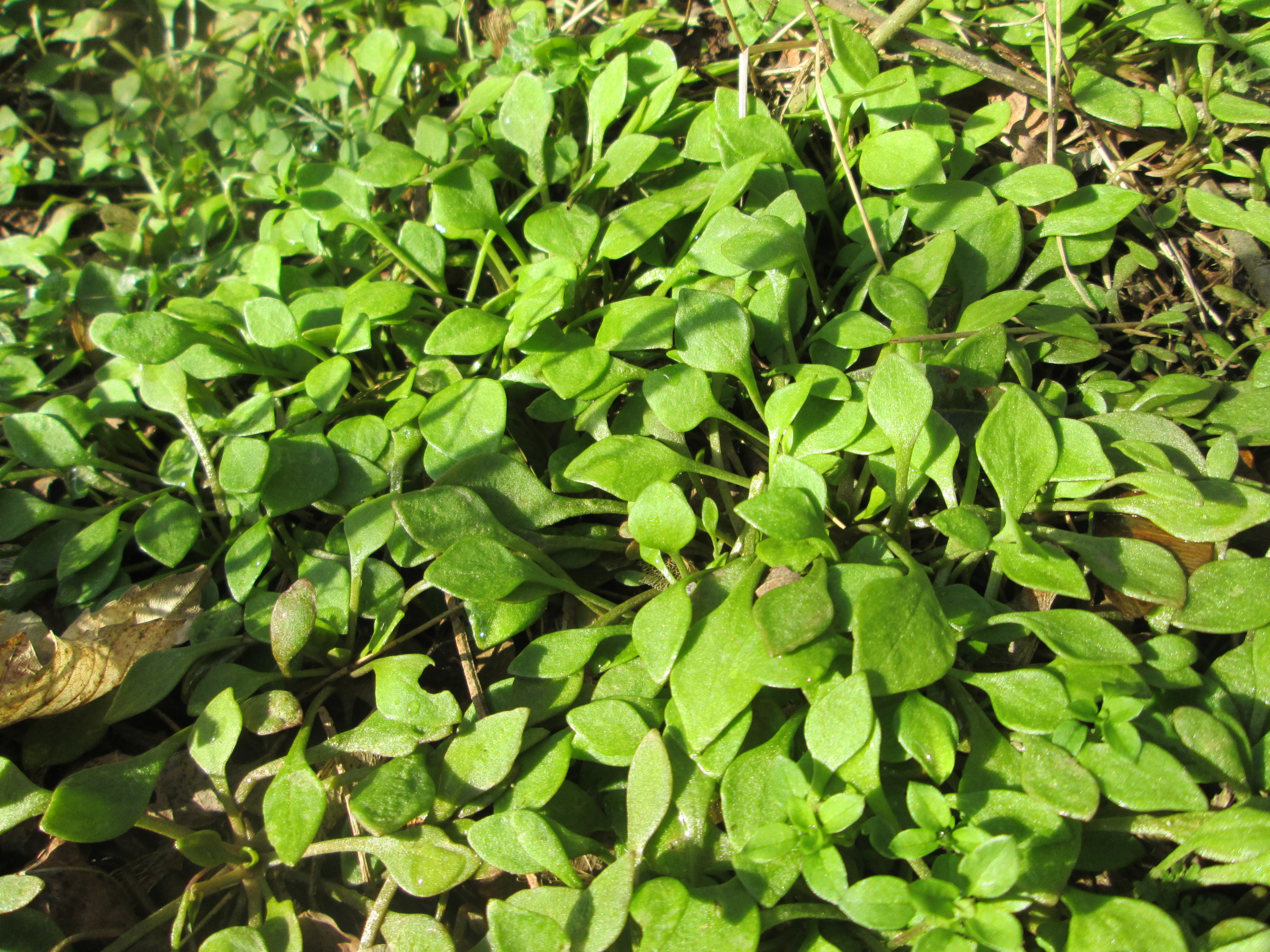 Gewöhnliches Tellerkraut oder Kubaspinat (Claytonia perfoliata) - invasiv an der Böschung der A61 bei Hockenheim - eingeschleppt aus Nordamerika